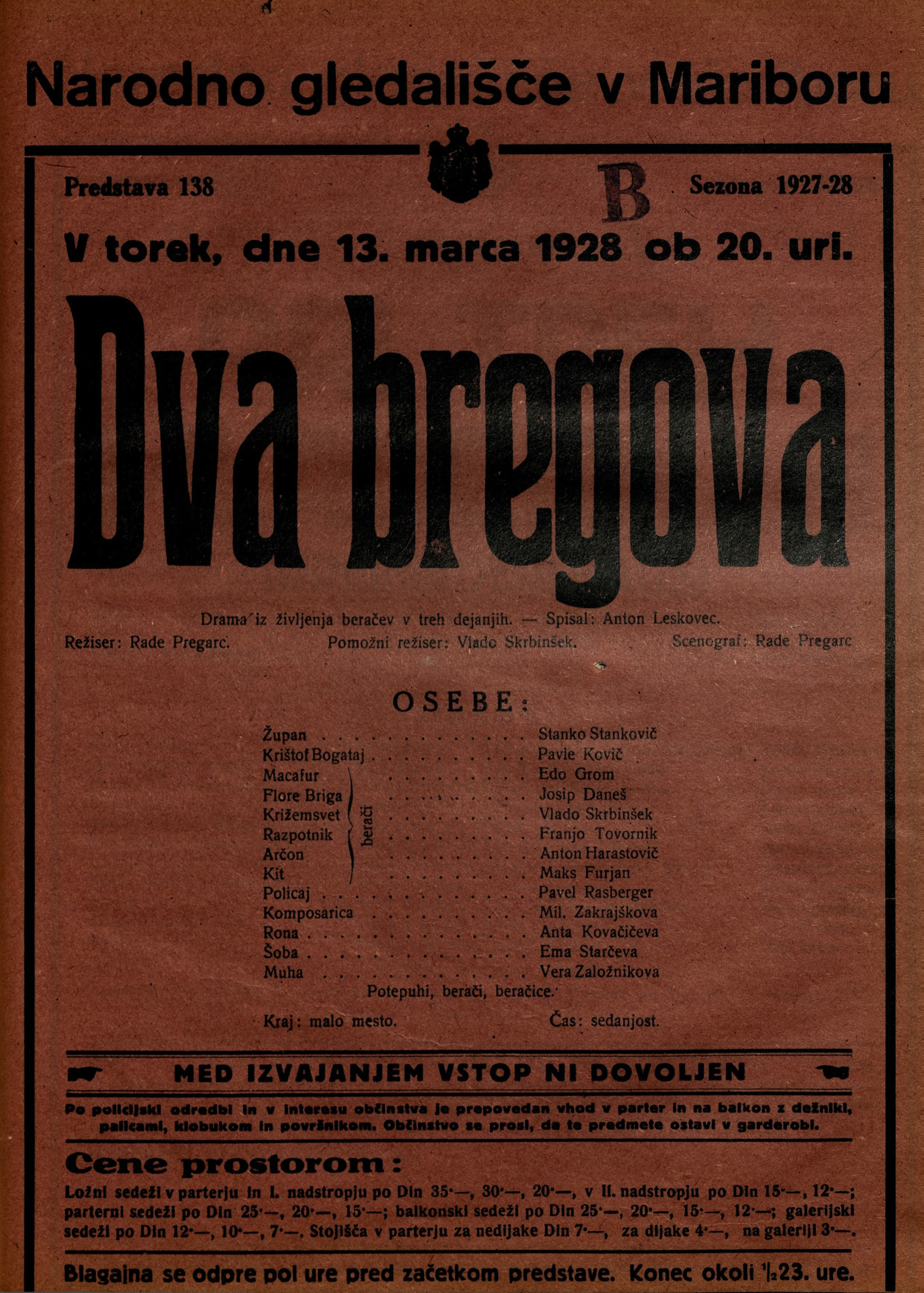 Plakat za predstavo Dva bregova v Narodnem gledališču v Mariboru.